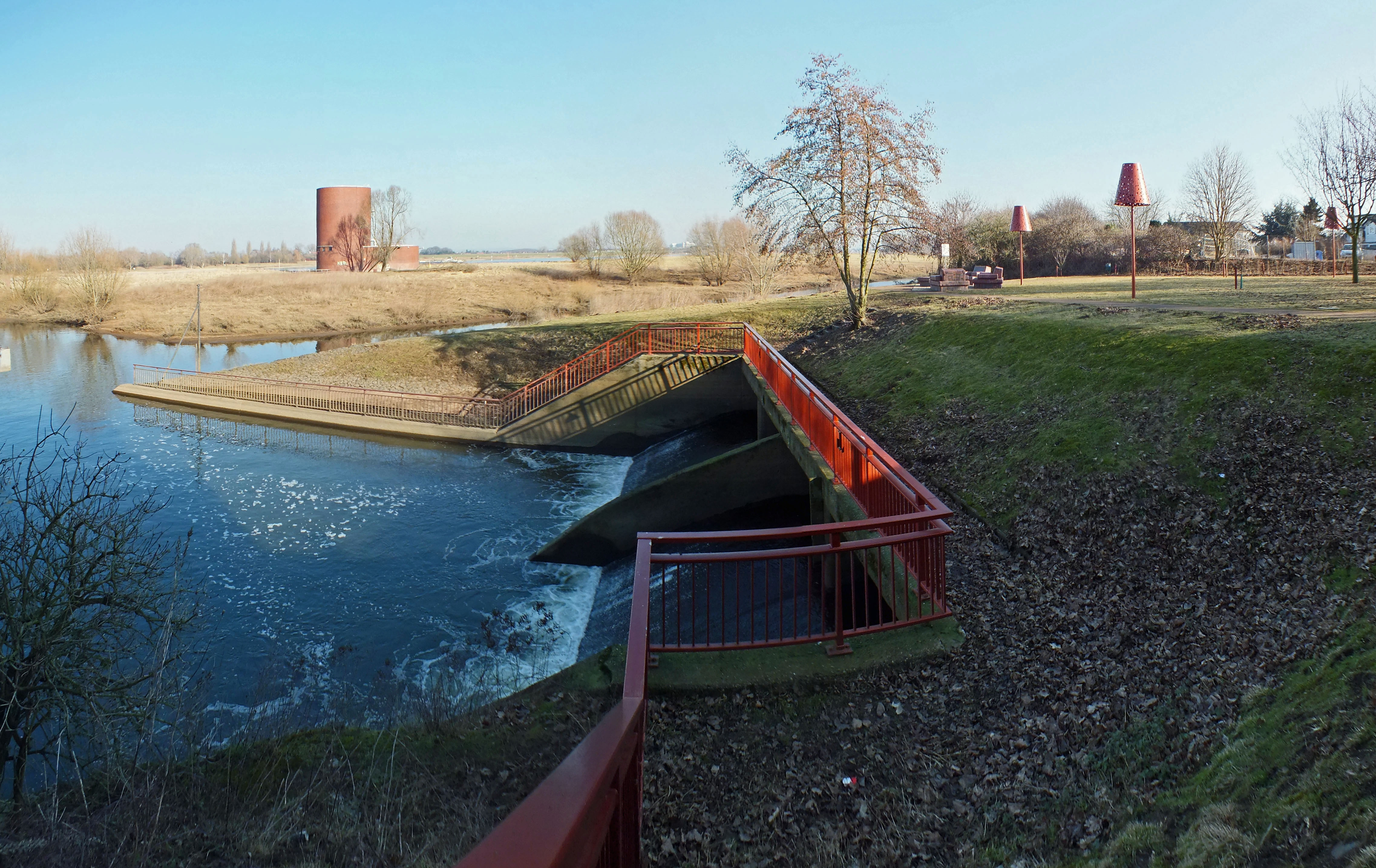 Kölner Randkanal Einmündung in den Rhein, Mündungspark "Alter Hafen"